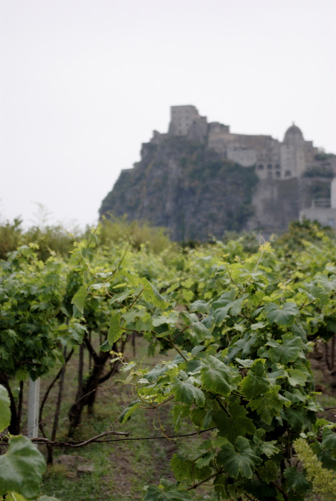 Vigneto nella frazione di Ischia Ponte. Il vino è uno dei prodotti tipici dell'isola d'Ischia, di cui si producono diverse varietà. Sullo sfondo il Castello Aragonese. Autore foto: Roberto De Martino